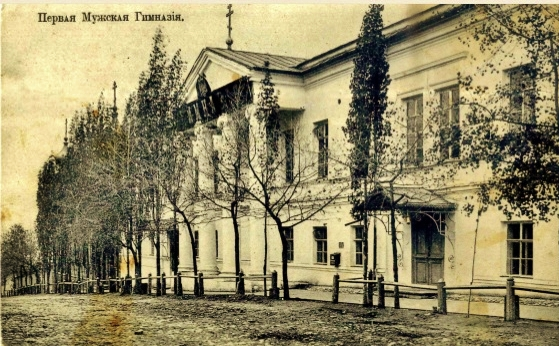 Il Primo liceo maschile di Saratov, dove studiò tra gli altri anche Nikolaj Gavrilovič Černyševskij